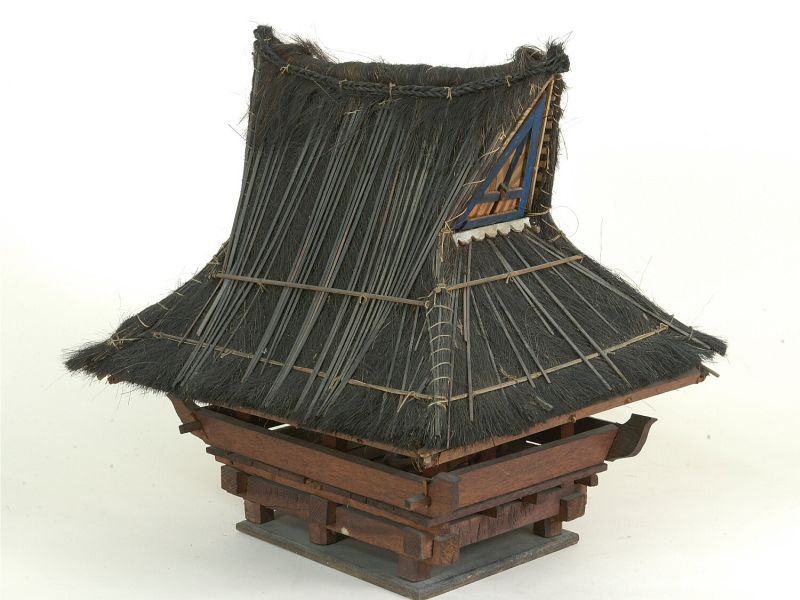 Huismodel. Model van een vergaderhuis, verblijfplaats voor jongeren en vreemdelingen Unknown language: Jambur